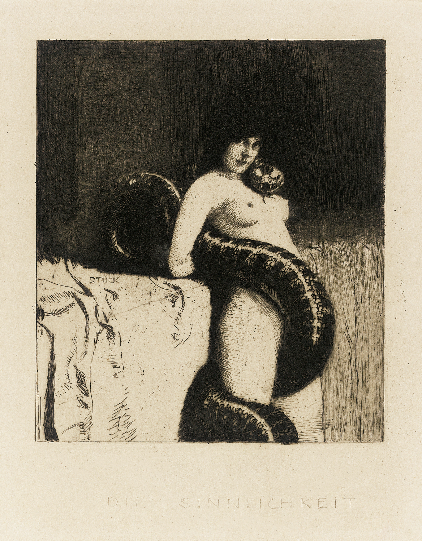 Franz von Stuck: Die Sinnlichkeit, um 1891, Radierung auf Büttenpapier, 21 x 18 cm